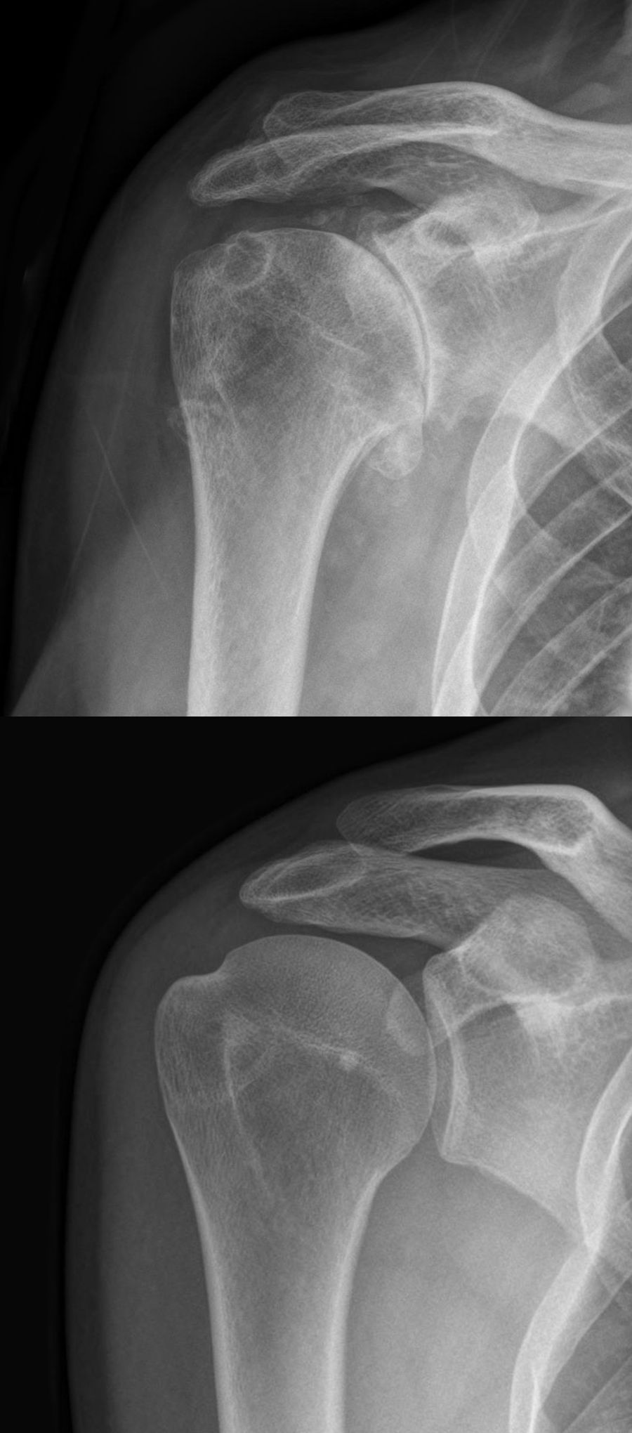 Oben Omarthrose, also Arthrose des Schultergelenks in der Röntgenaufnahme. Verschmälerung des Gelenkspaltes und vermehrte Sklerosierung der subchondralen Lamellen. Periartikuläre Verkalkungen und ossäre Ausziehungen vor allem am Unterrand des Humerus. Der Subakromiale Raum ist noch weitgehend erhalten. Eine Läsion der Rotatorenmanschette gehört auch nicht zwingend zur Omarthrose, auch wenn beides oft vergesellschaftet ist. Darunter zum Vergleich eine gesunde Schulter.